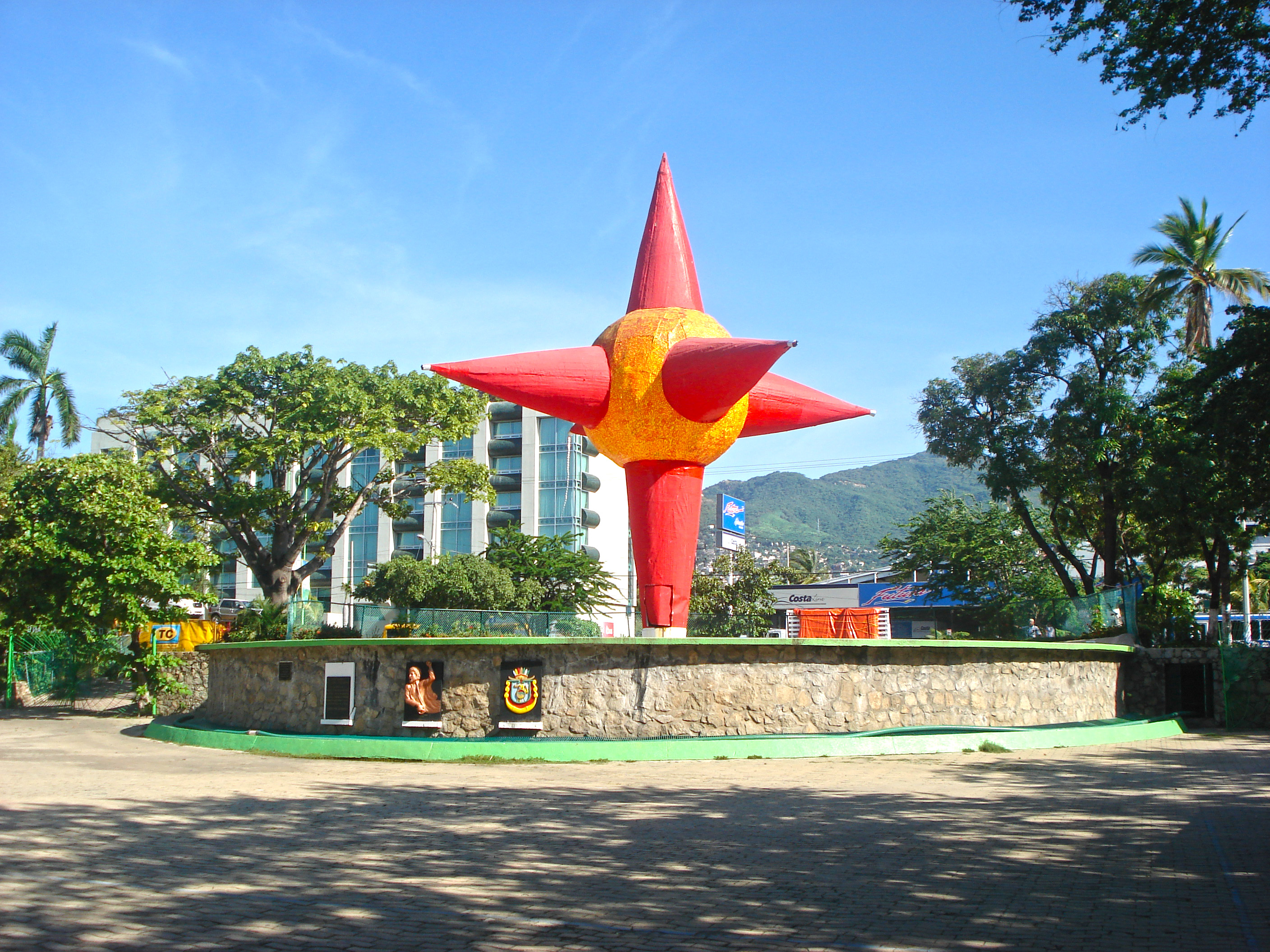 Escultura de una Piñata en el acceso posterior del Parque Papagayo, en Acapulco, Guerrero, México.